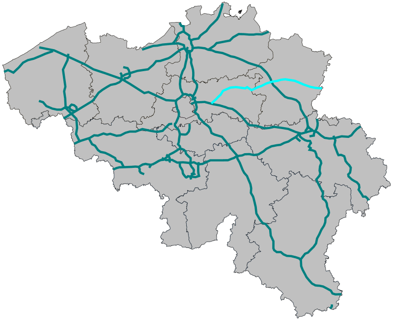 Traject A2 (België)